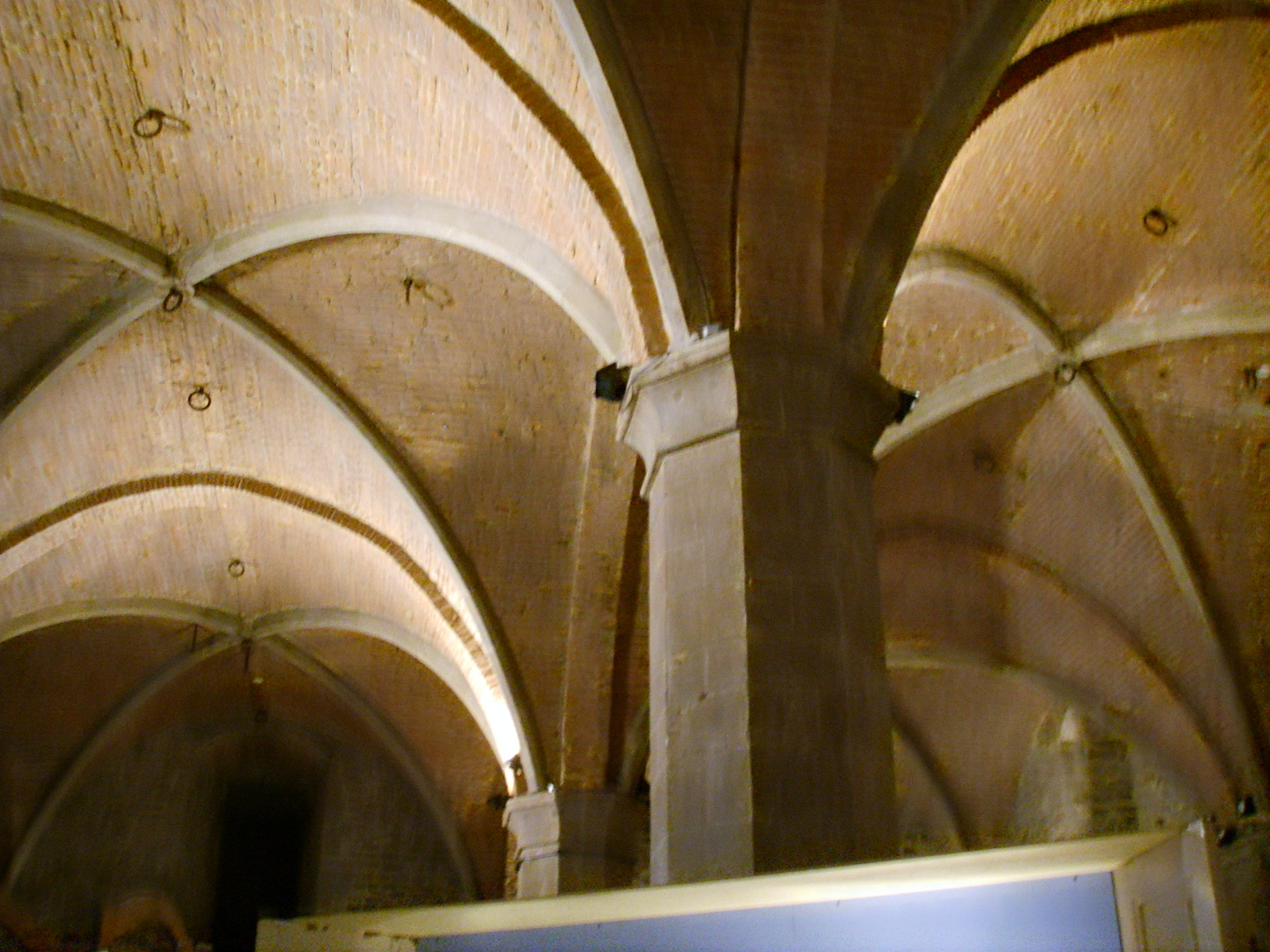 Palazzo vecchio, sala d'arme